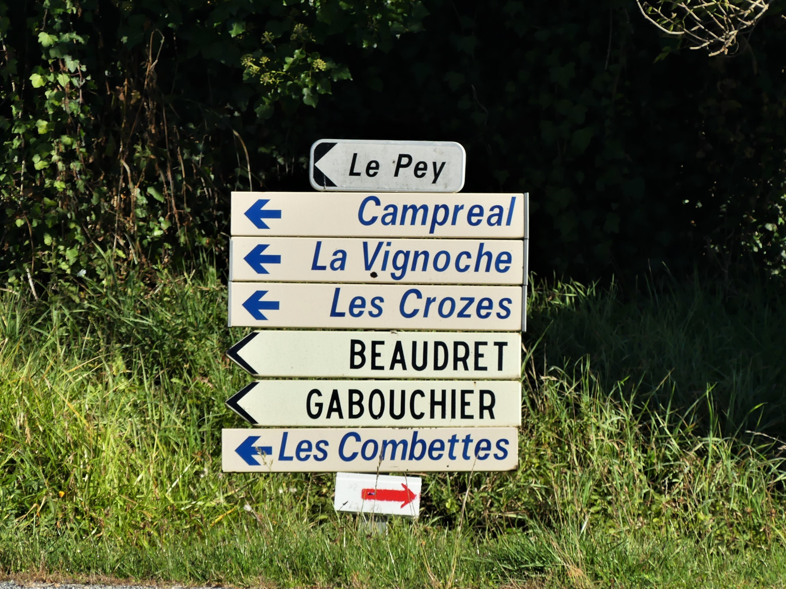 Panneaux de lieux-dits, Saint-Jean-d'Eyraud, Dordogne, France.